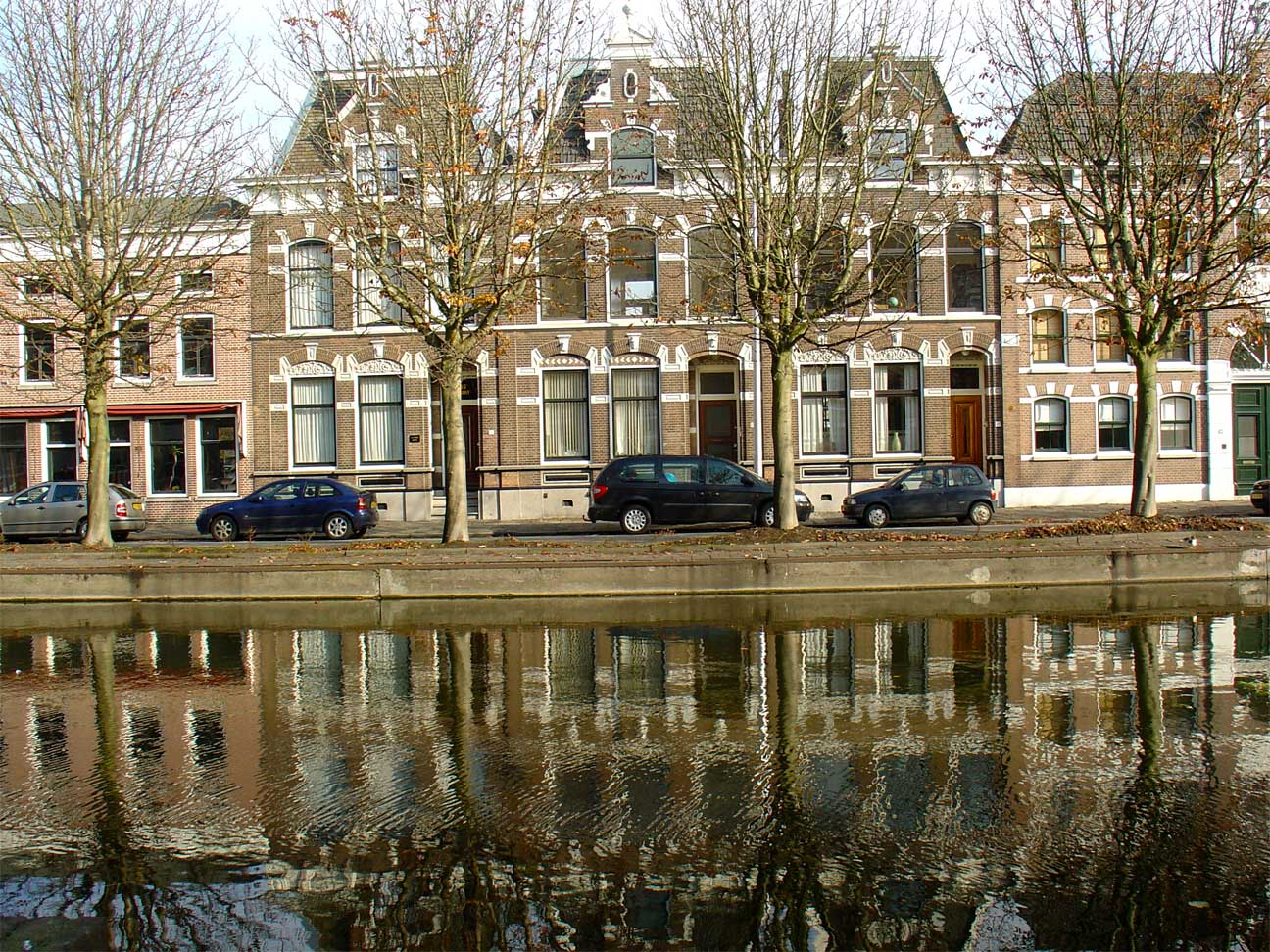 Blekkerssingel 55 t/m 57 woningen behorend bij de voormalige klederblekerij annex wasserij Het wapen van Amsterdam op nr. 58